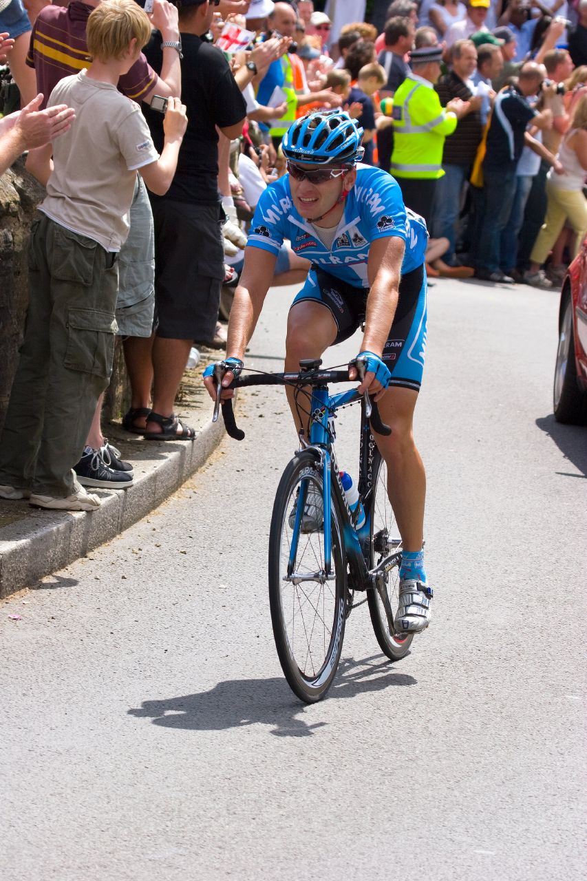 Andrij Grivko/Andriy Hryvko Tour de France Stage 1 Kent UK - "Cote de Goudhurst " Mountain Stage Tour de France 2007 UK Stage.